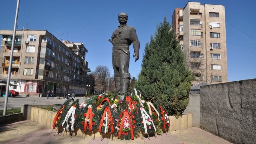 Паметник